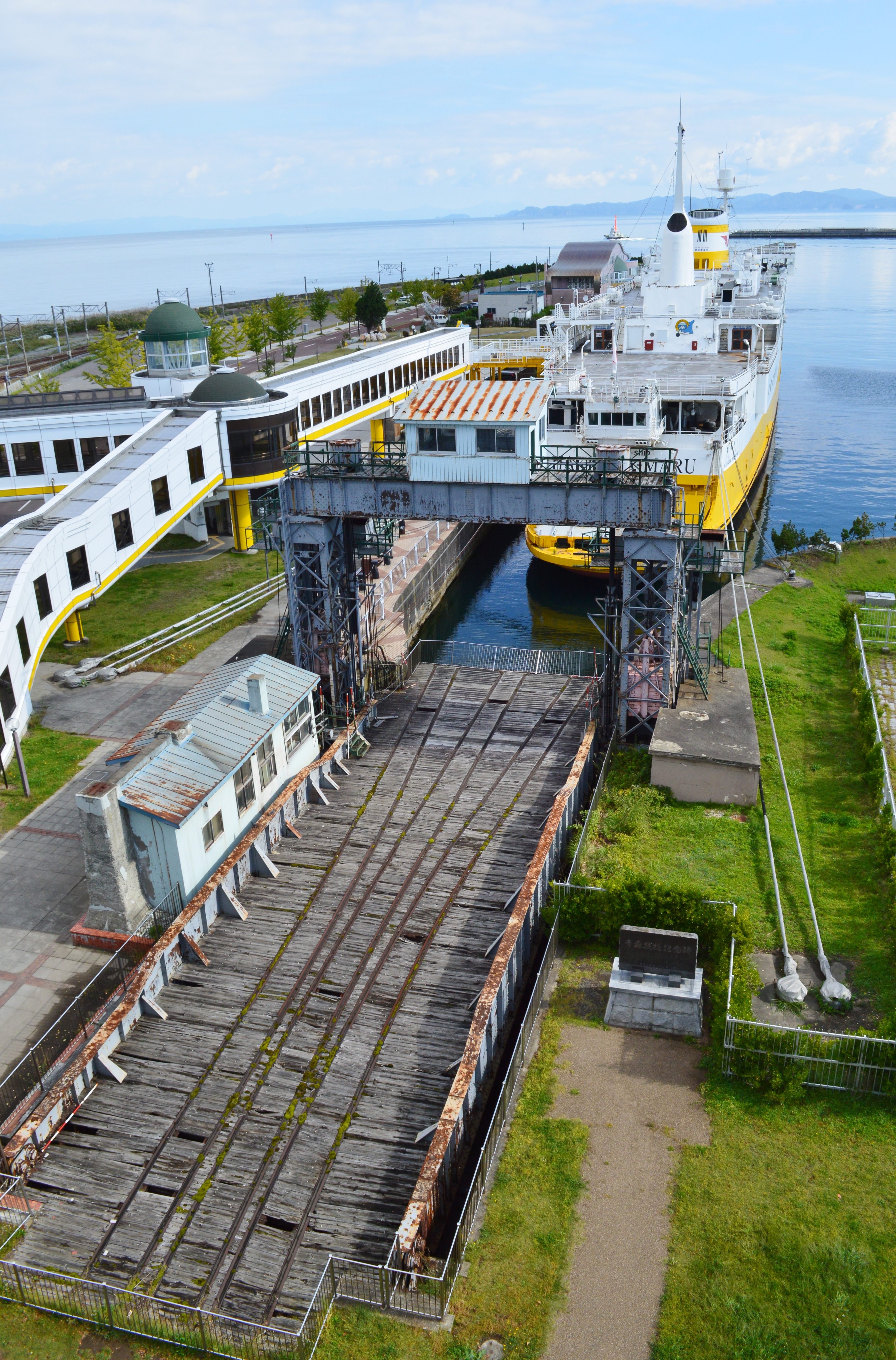 八甲田丸 背面